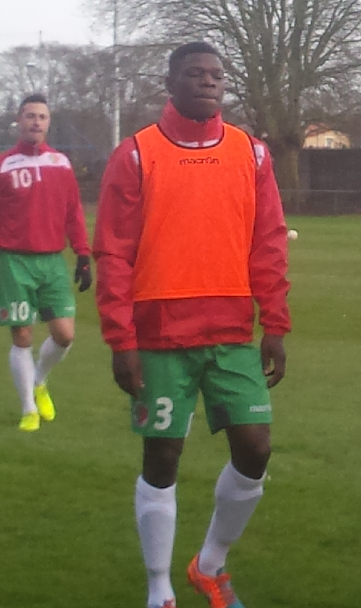 Bakaye Dibassy avant la rencontre Lens B - Sedan, au Stade François-Blin d'Avion, match comptant pour le championnat de France de CFA (quatrième division française), le 24 janvier 2015.